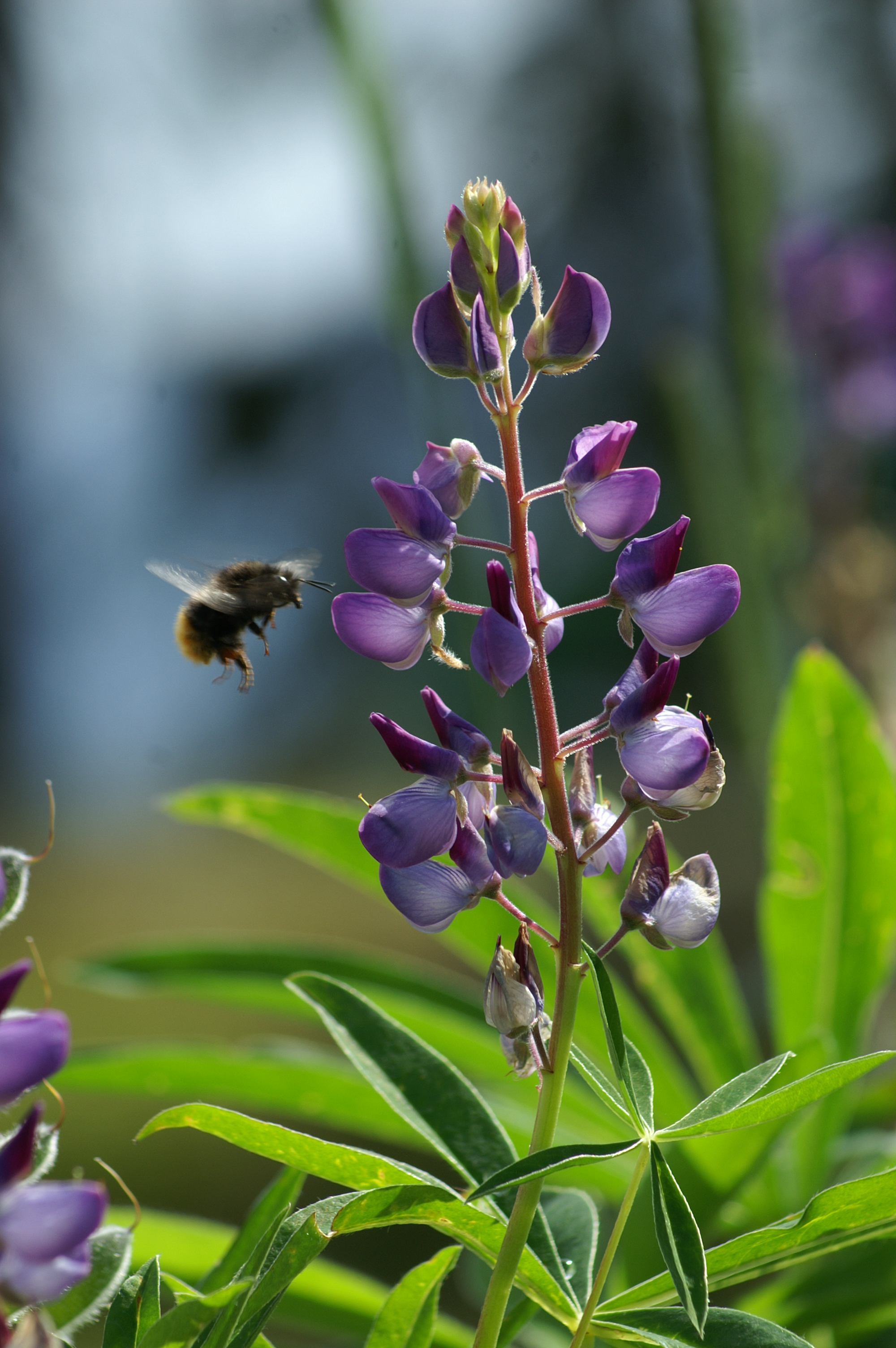 Wild Lupine, gesehen am Arzjoch Speichersee in Fügen Tirol